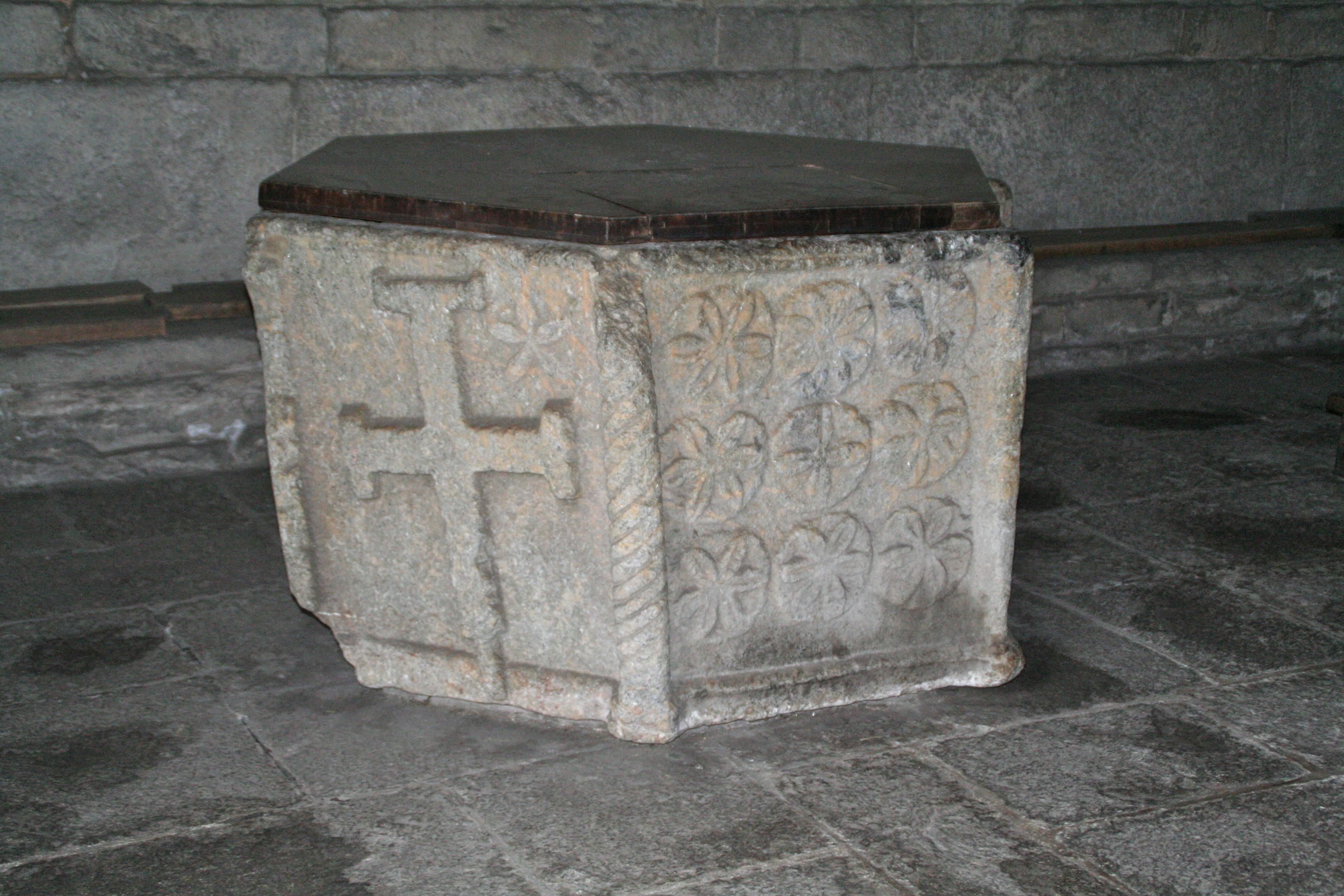 Taufstein in San Nicola (Giornico)